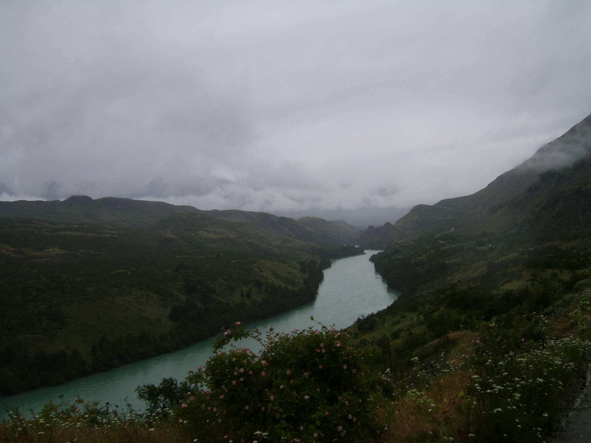 Río Baker, sector Balsa Baker.